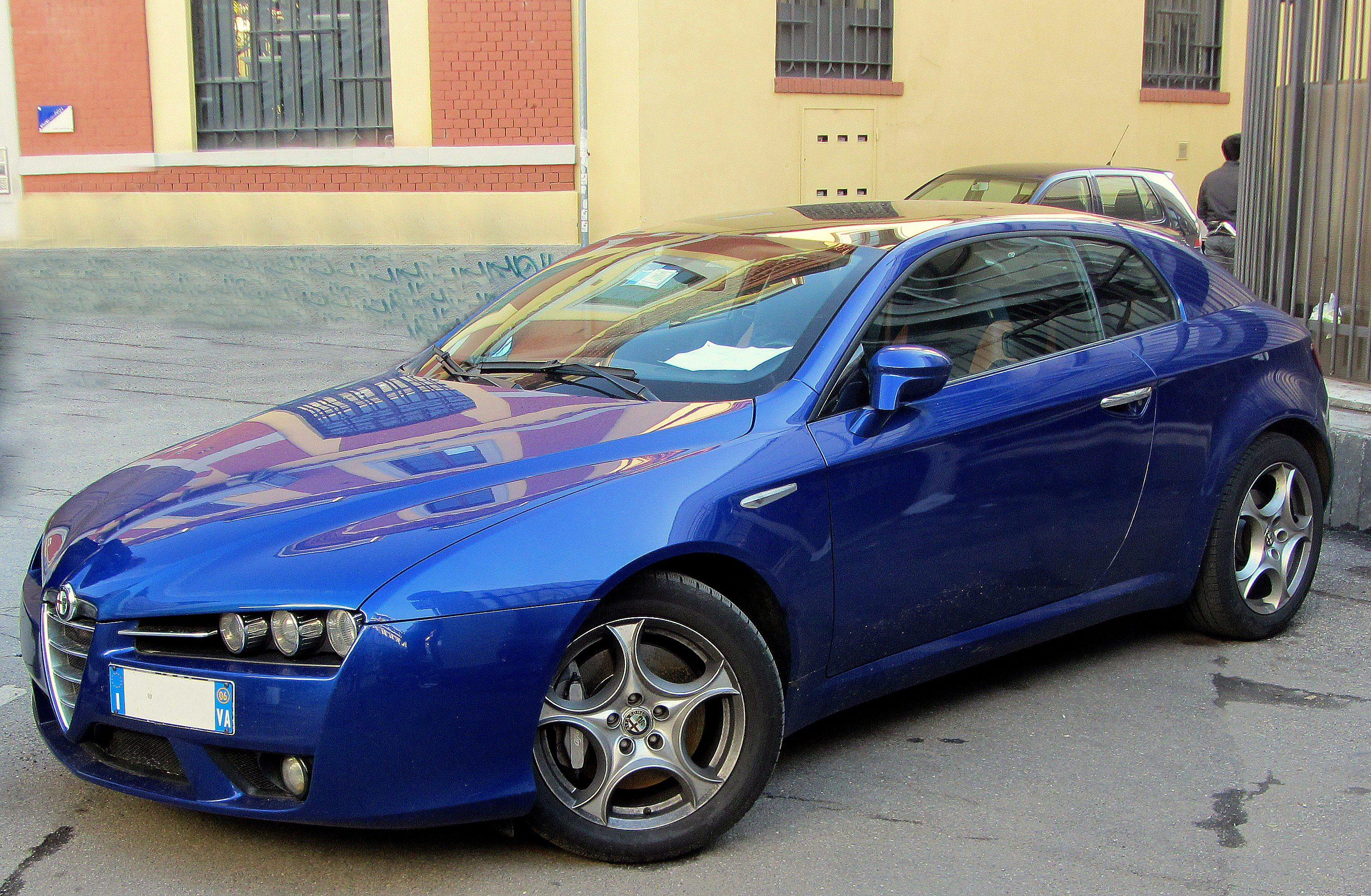 Un' Alfa Romeo Brera blu elettrico a Milano in zona Tortona, di fronte ai laboratori di Superstudio. fotografia fatta durante il fuorisalone 2012